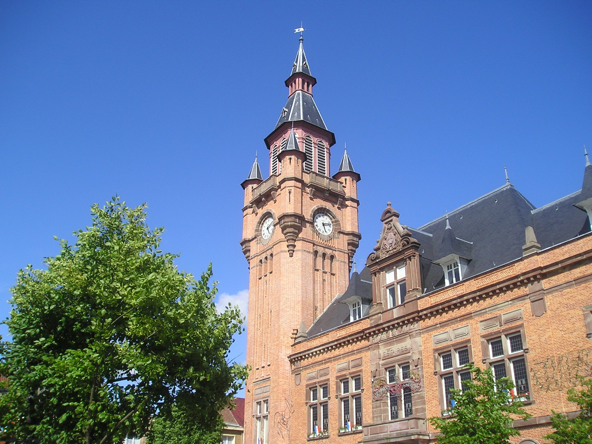 Estaires : le beffroi.